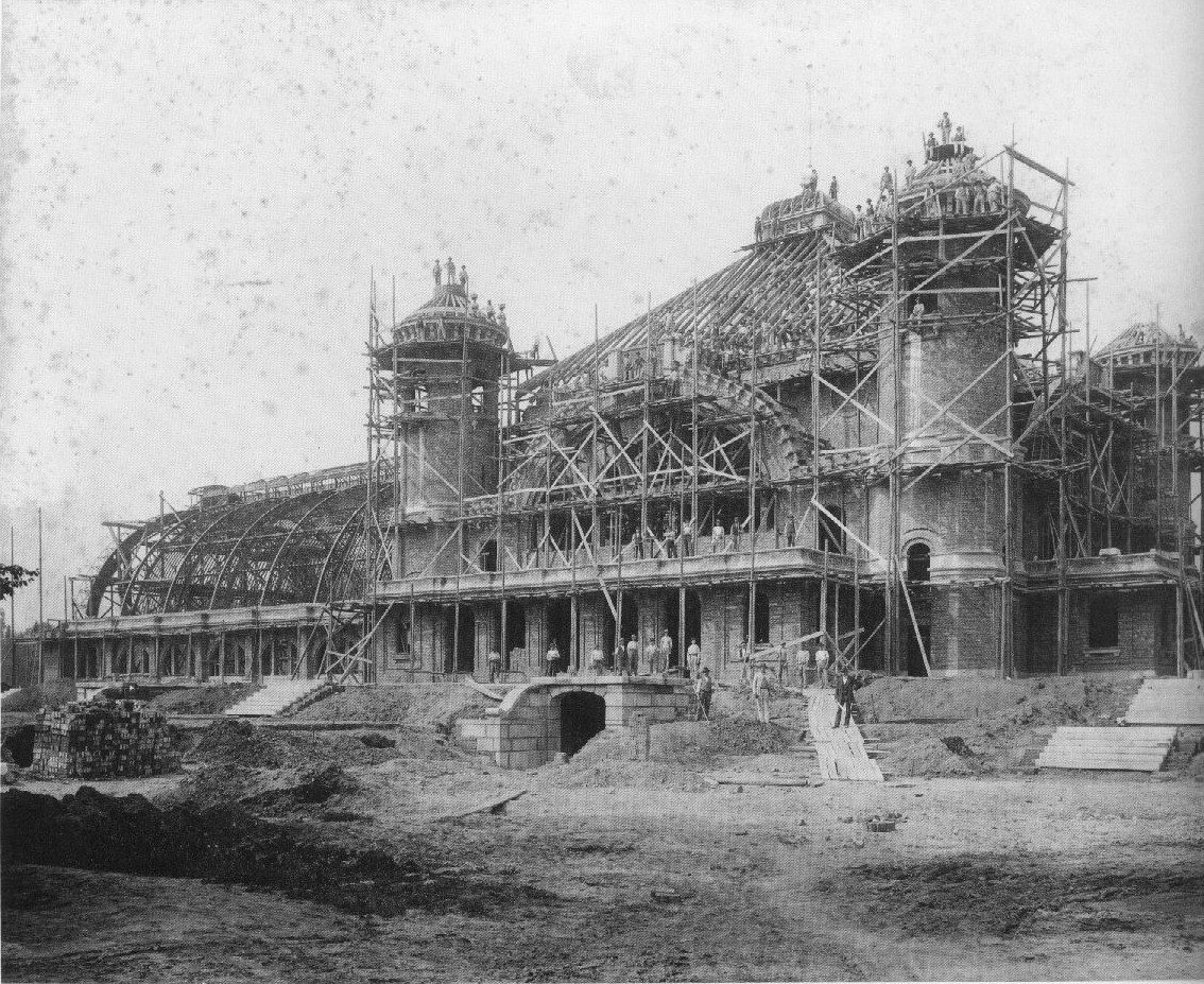 Bau des Gesellschaftshauses Palmengarten in Leipzig, Frankfurter Straße (heute Jahnallee), vor 1899.